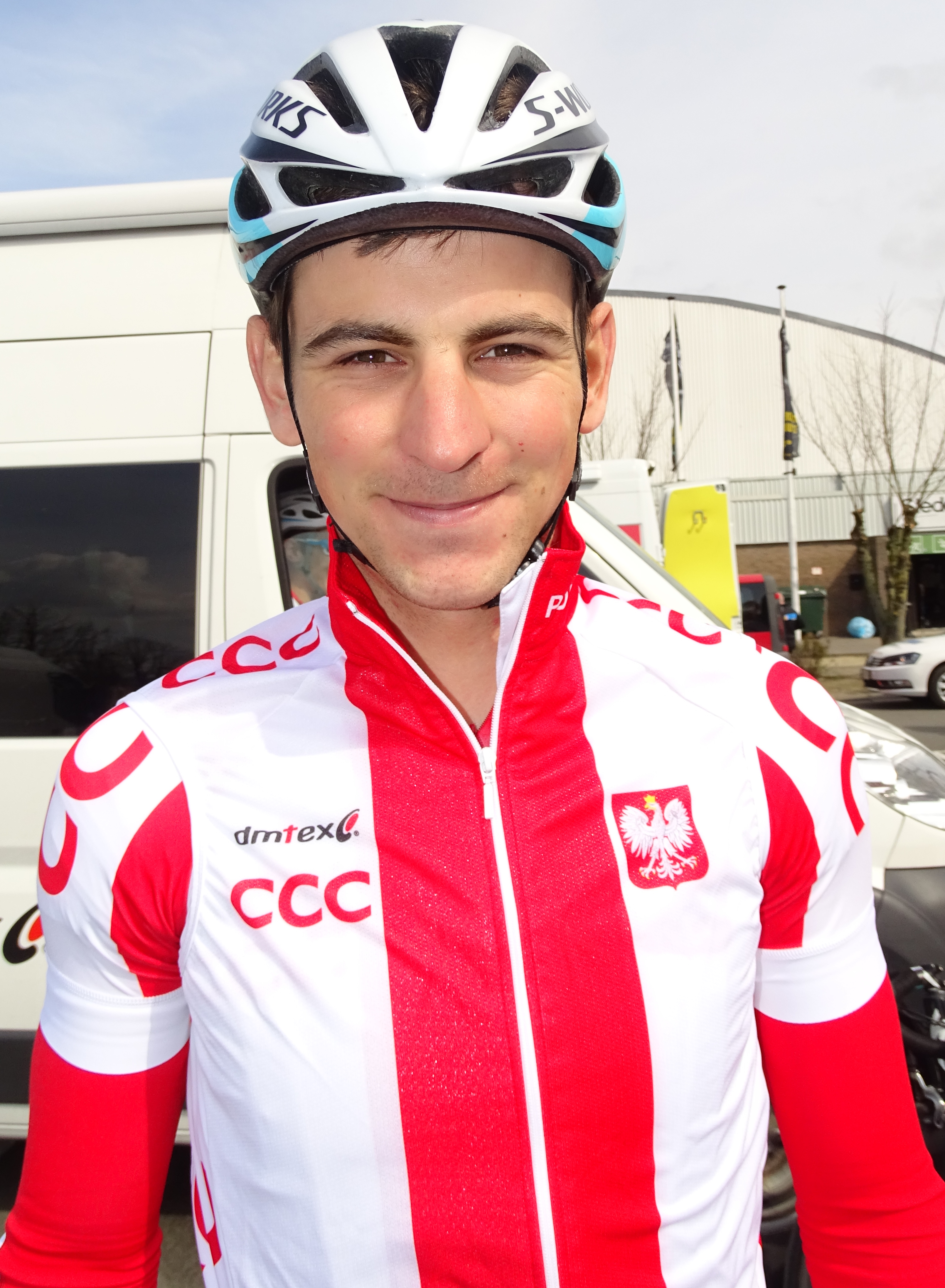 Reportage réalisé le samedi 9 avril à l'occasion du départ et de l'arrivée du Tour des Flandres espoirs 2016 à Audenarde, Belgique.